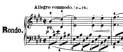 Compassos iniciais do terceiro movimento da Sonata Op. 14 número 1 de Beethoven